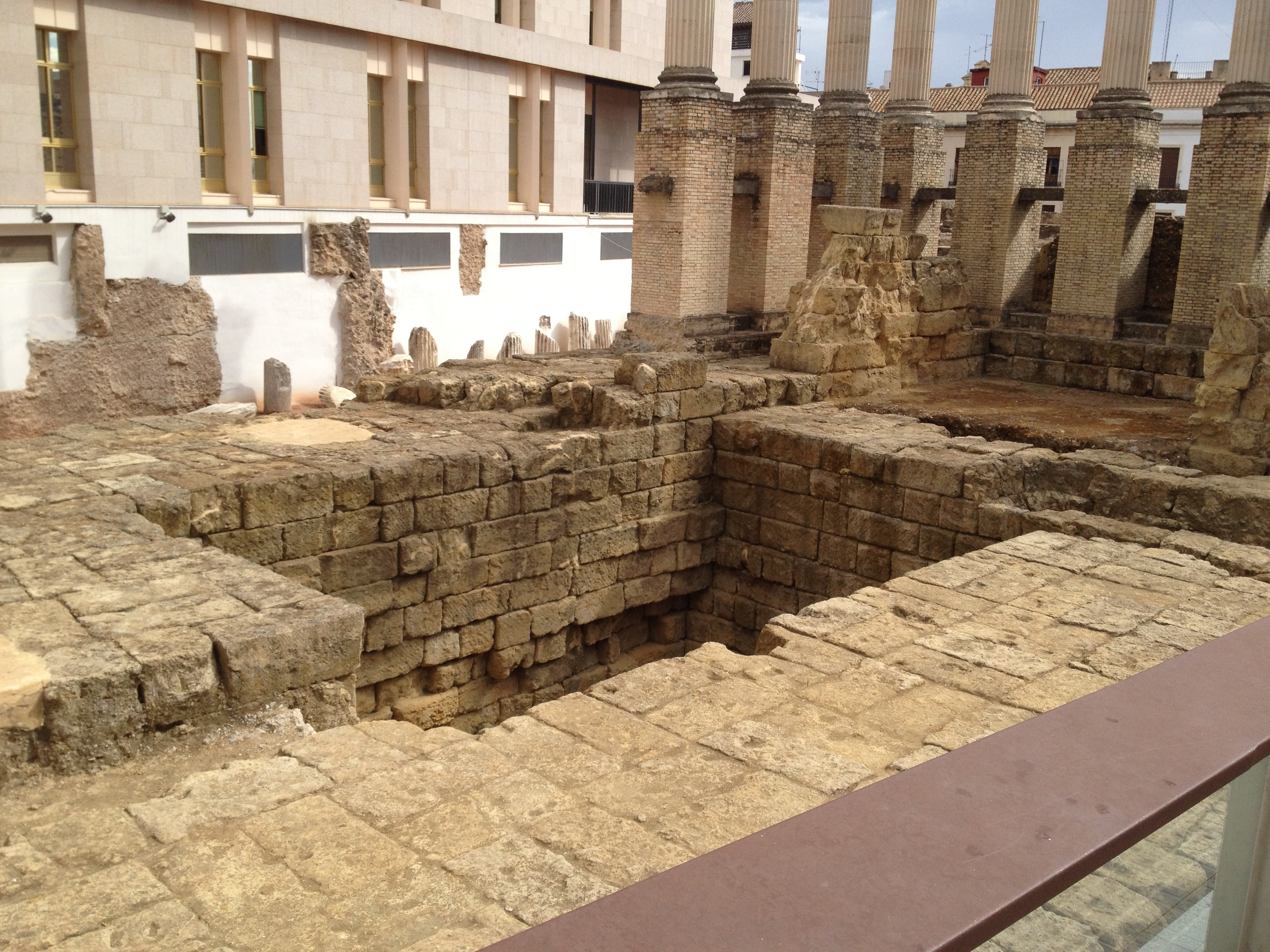 Templo romano de Córdoba (España).